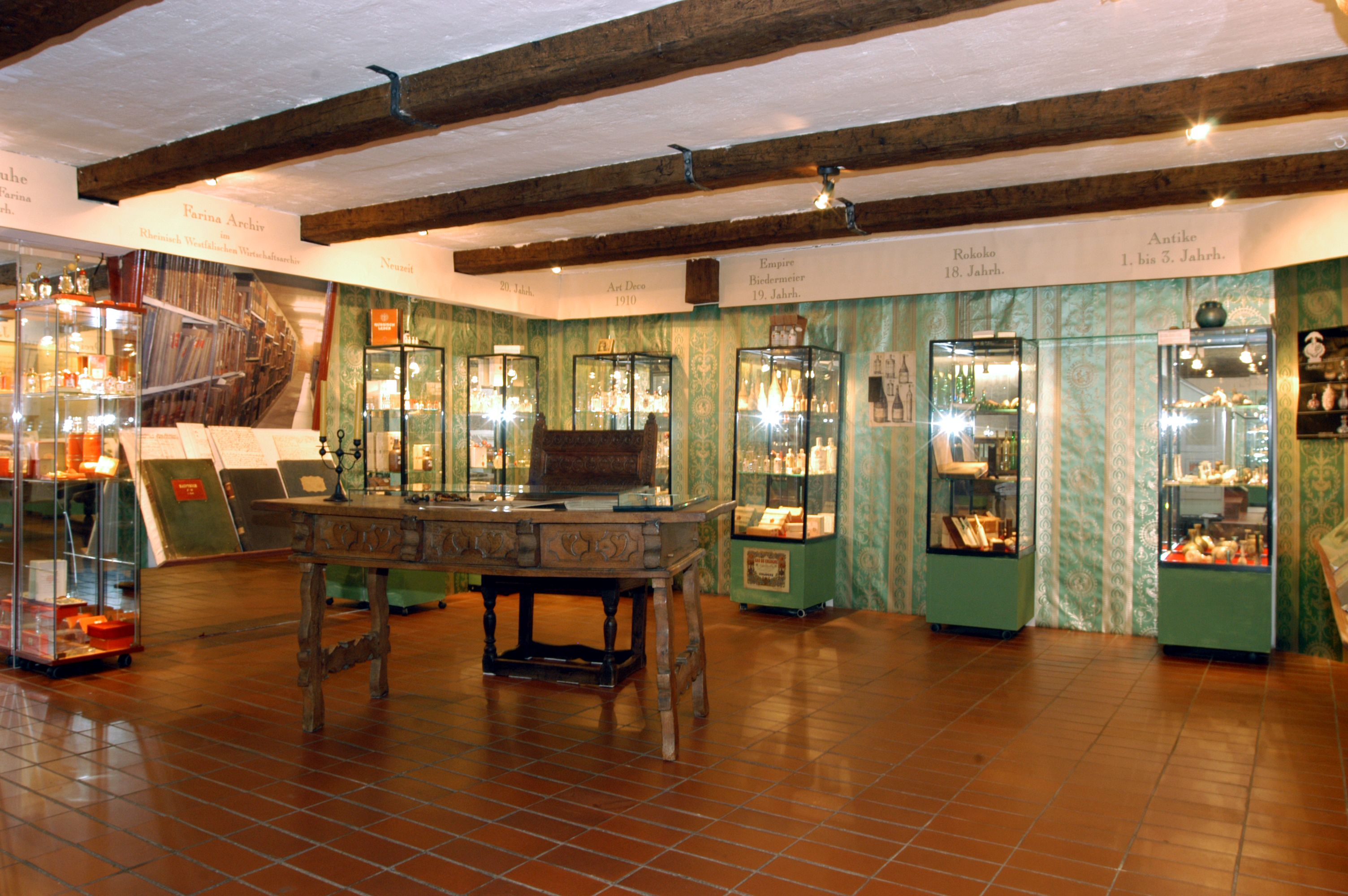 Duftmuseum Farina, Köln